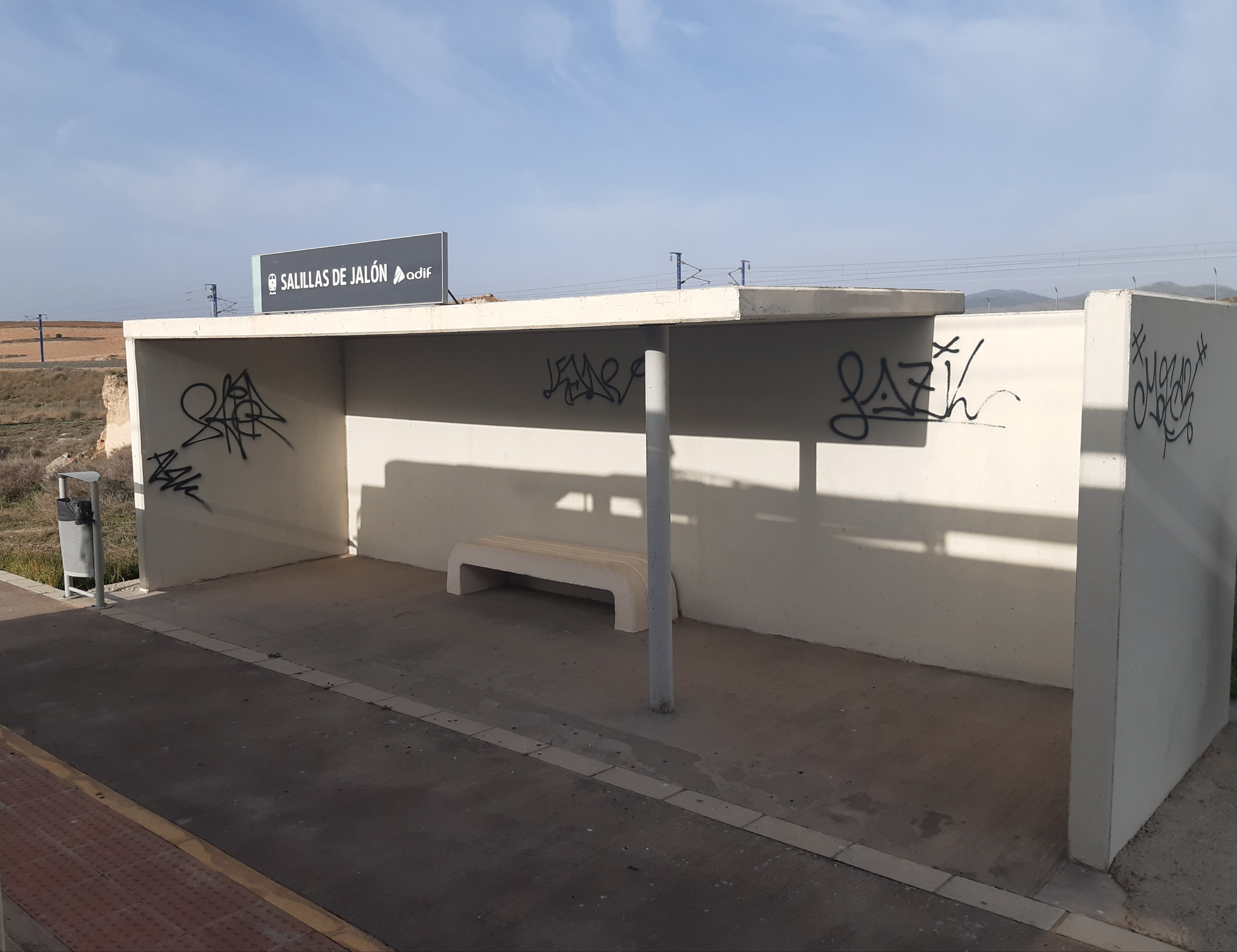 Refugio del apeadero ferroviario de Salillas de Jalón (Zaragoza) el 27 de febrero de 2020. Foto tomada desde un tren R-470 con destino Madrid-Chamartín. Al fondo se puede ver el tendido de Alta Velocidad.